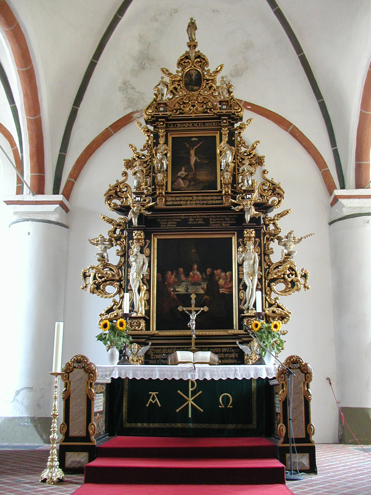 Der Barockaltar